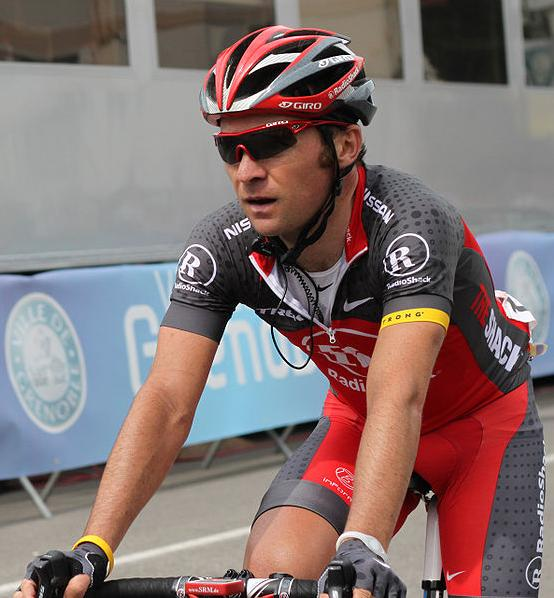 Sérgio Paulinho à son arrivée à Grenoble après la 5e étape du Critérium du Dauphiné 2010